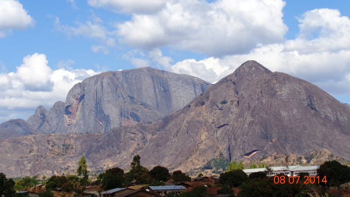 Malema e a Montanha